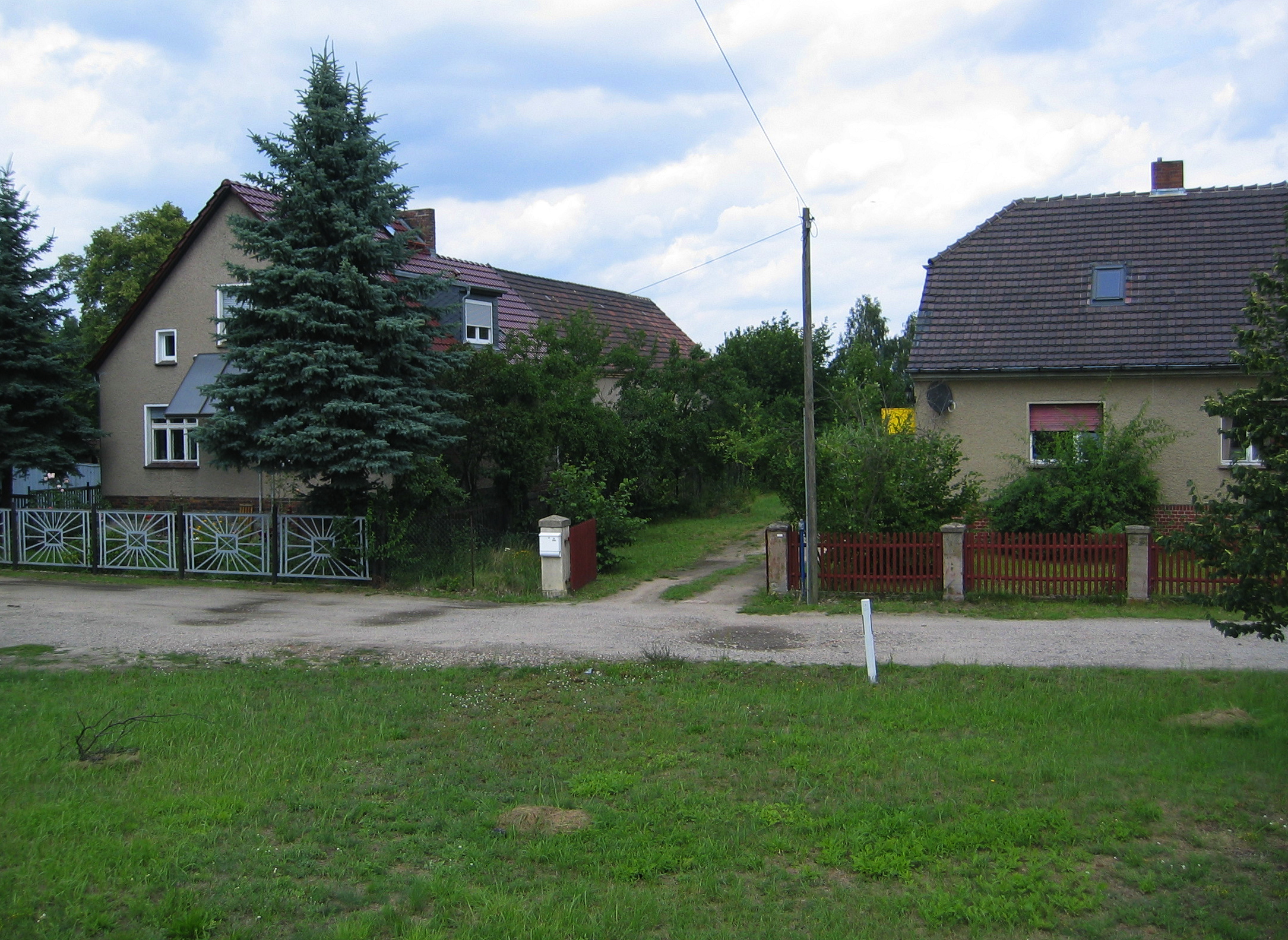 Letzte Häuser direkt am Ortseingang von Lakoma, Cottbus, Deutschland.